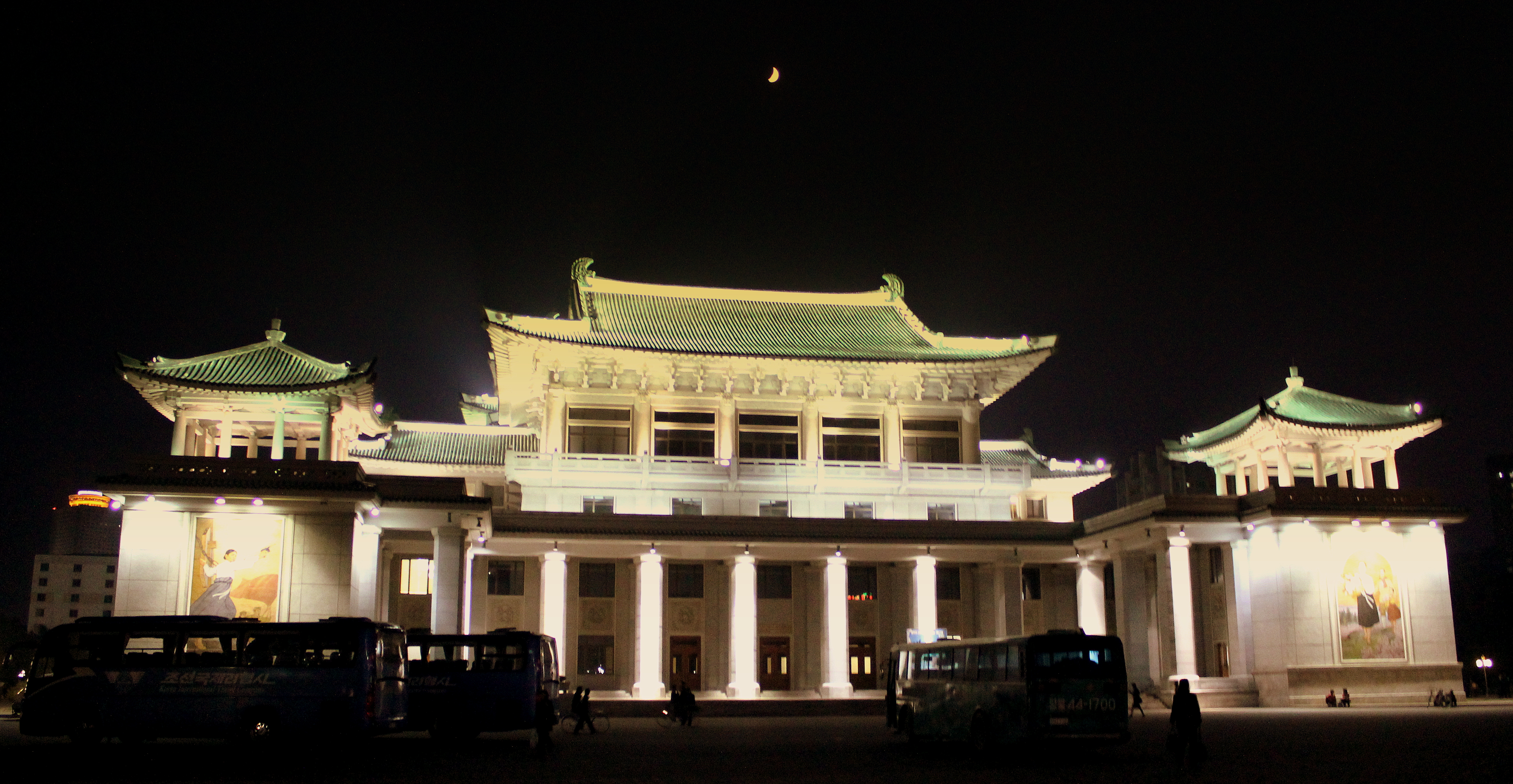 PYONGYANF CITY DPRK NORTH KOREA OCT 2012